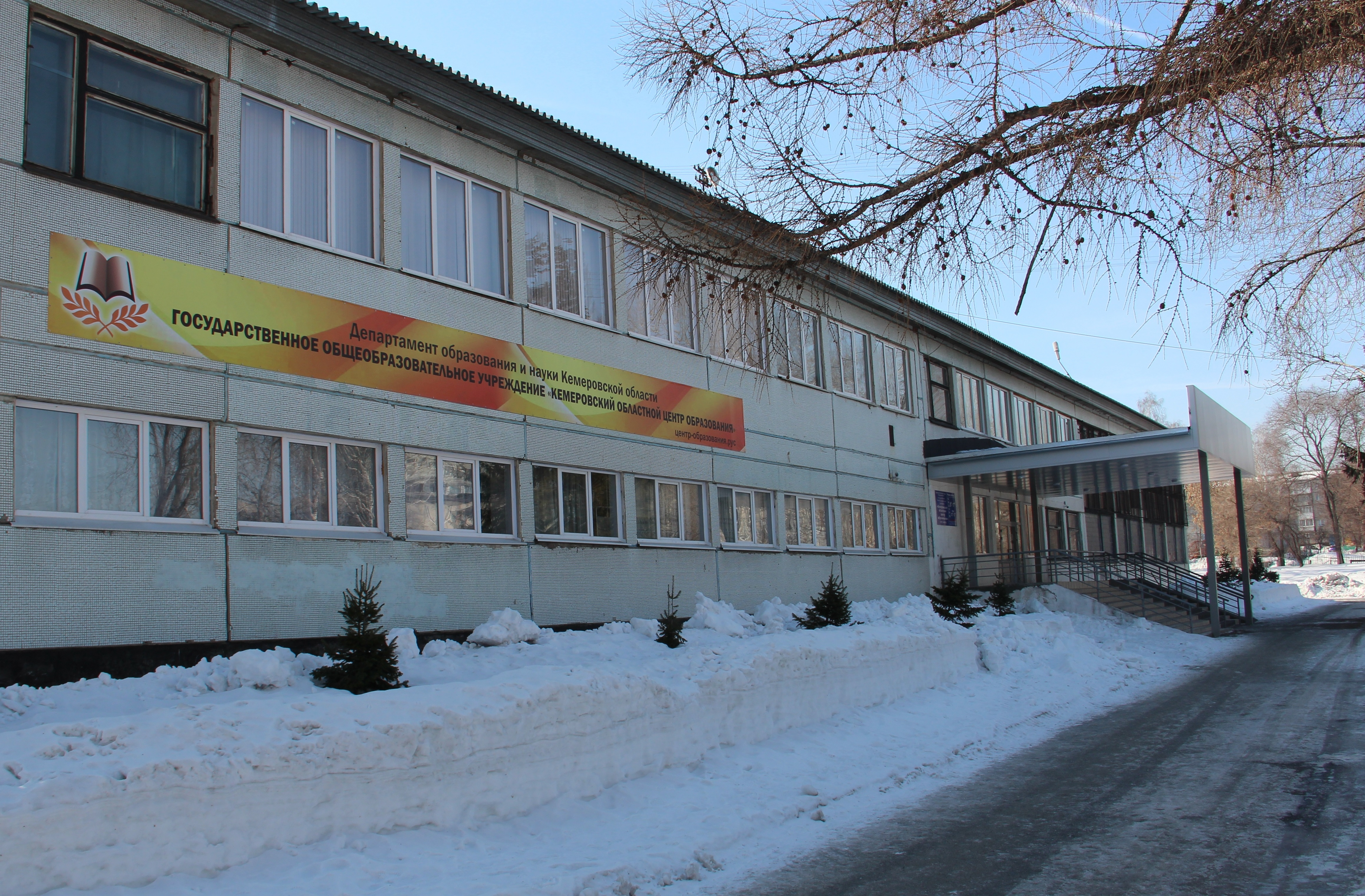 Фасад